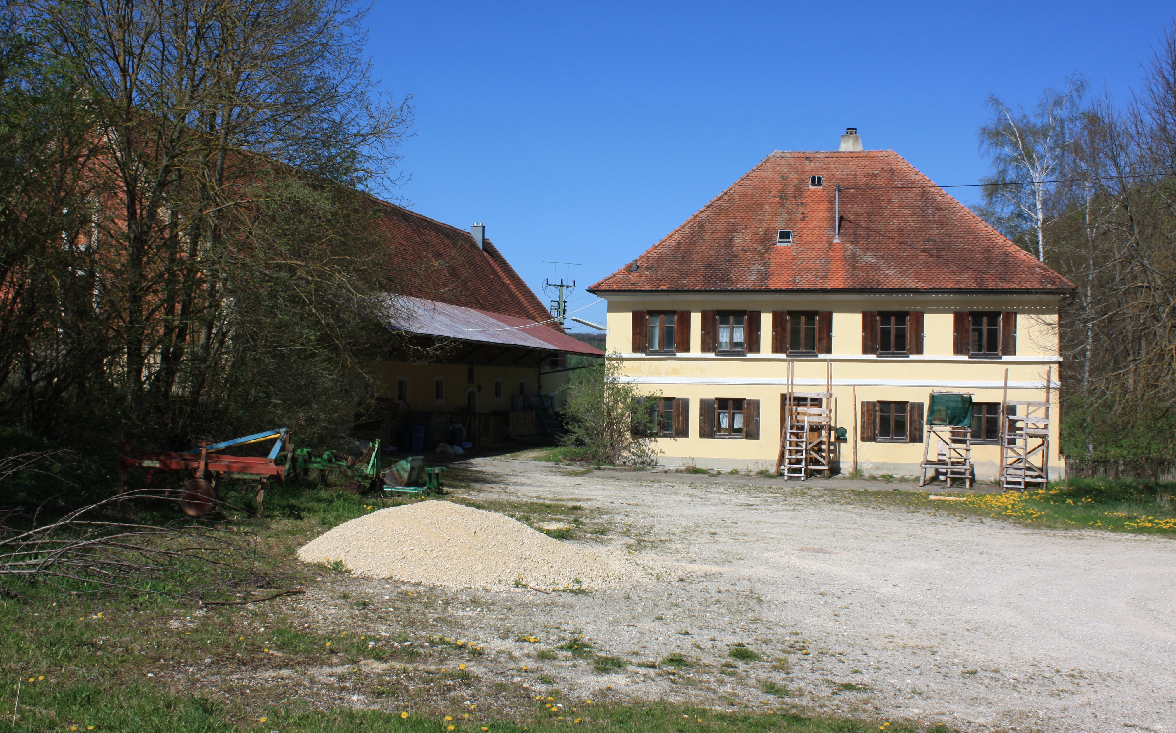 Das Gutshofsgebäude des Karlshofes